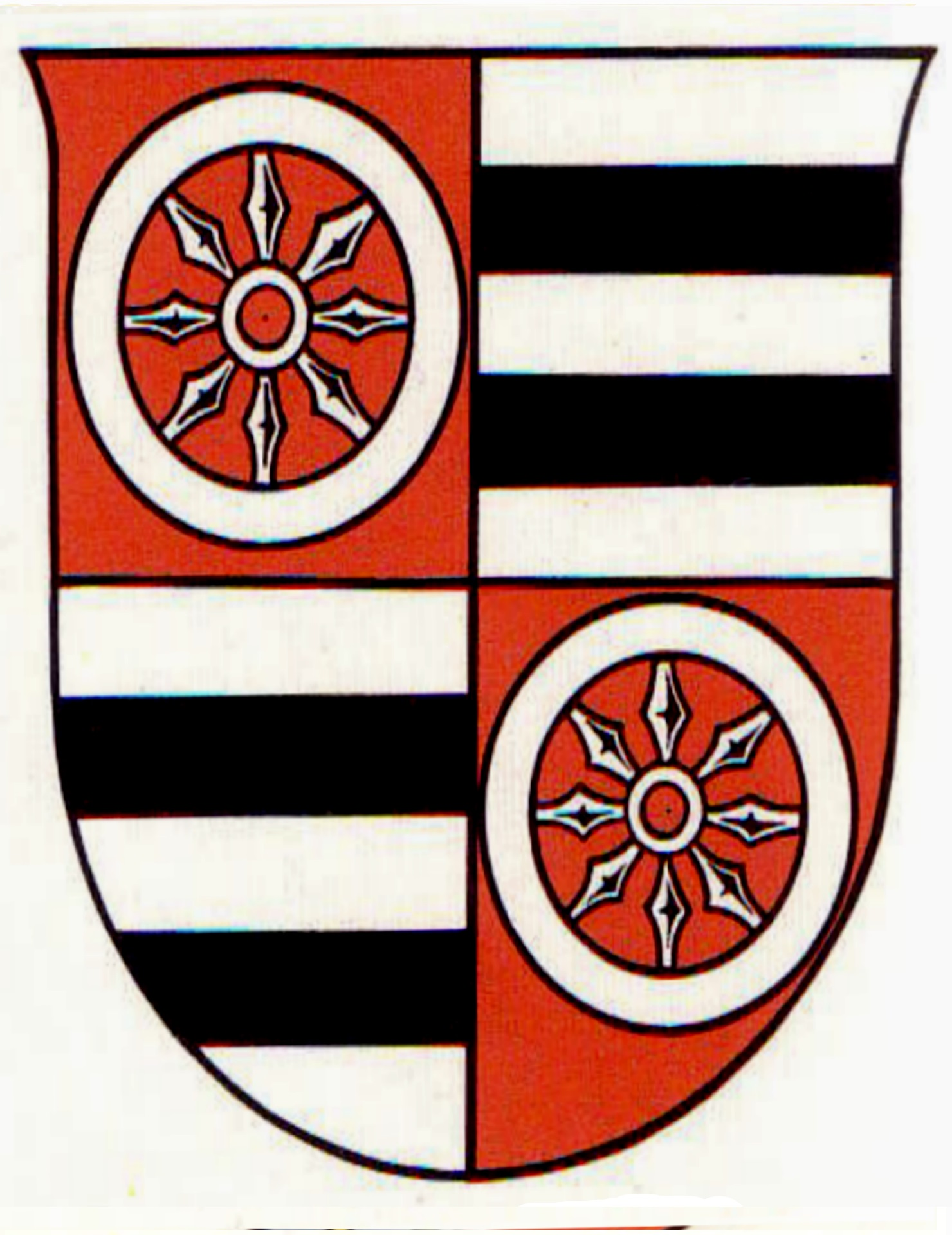 Wappen Diether von Isenburg Erzbischof von Mainz 1434-1459